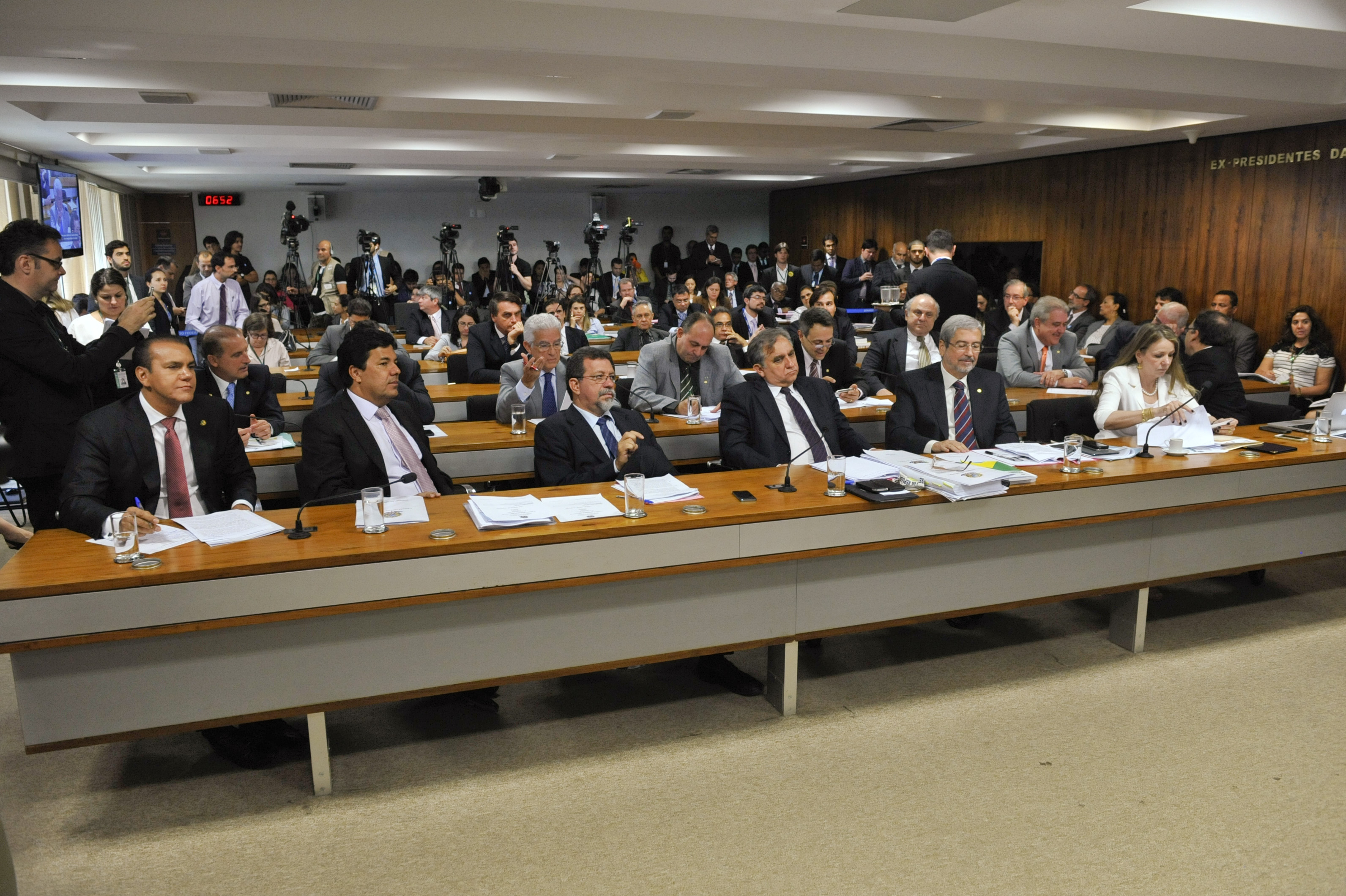 Sala de comissões do Senado Federal durante reunião da CPI Mista da Petrobras. Depoimento do atual diretor de Abastecimento da Petrobras, José Carlos Cosenza. Ele assumiu o cargo no lugar de Paulo Roberto Costa. Cosenza, segundo o requerimento apresentado pelo deputado Rubens Bueno (PPS-PR), poderia ter ligações com esquema que envolveria o ex-diretor e o doleiro Alberto Youssef. Os dois foram presos pela Polícia Federal na Operação Lava Jato. O depoimento estava previsto para acontecer na semana passada, mas o diretor da Petrobras apresentou um atestado médico para se declarar impossibilitado de comparecer. Foto: Marcos Oliveira/Agência Senado